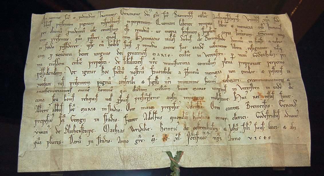 Schenkungurkunde 1240, lateinisch abgefasst. Erzbischofs Gerhard von Bremen überläßt dem von Ritter Heinrich II von Barmstede gegründete Nonnenkloster Uetersen sämtliche Einnahen aus dem Dorf Horst aus. In Dieser Urkunde wird der erste Klosterpropst mit Namen Godesschacus erwähnt. Fotografiert im Museum Langes Tannen in Uetersen.